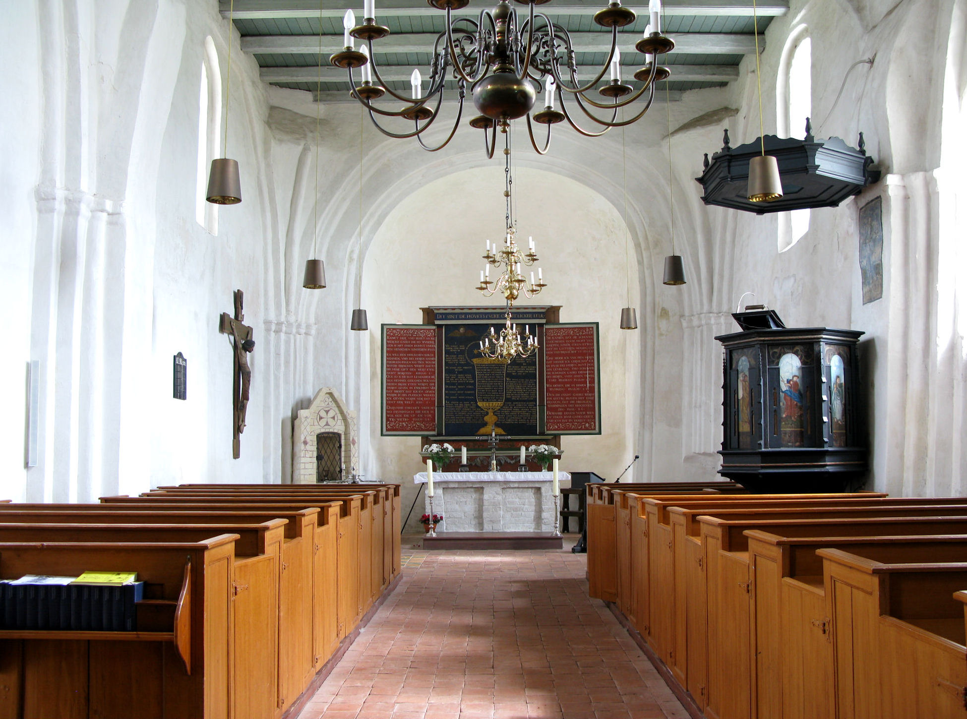 Inneneinrichtung in Roggenstede, Ostfriesland, Niedersachsen